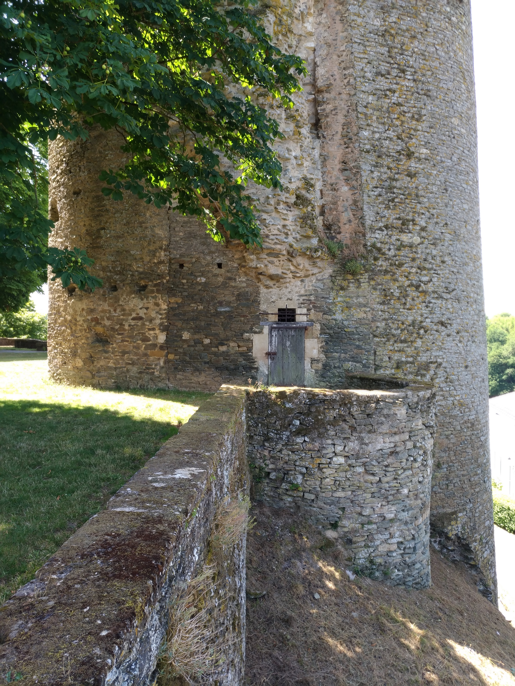 Le bas de la tour Mélusine située à Vouvant. L'on voit une porte qui dessert la petite salle du rez-de-chaussée. Cette dernière a servi à la conservation des denrées alimentaires à l'époque médiévale.